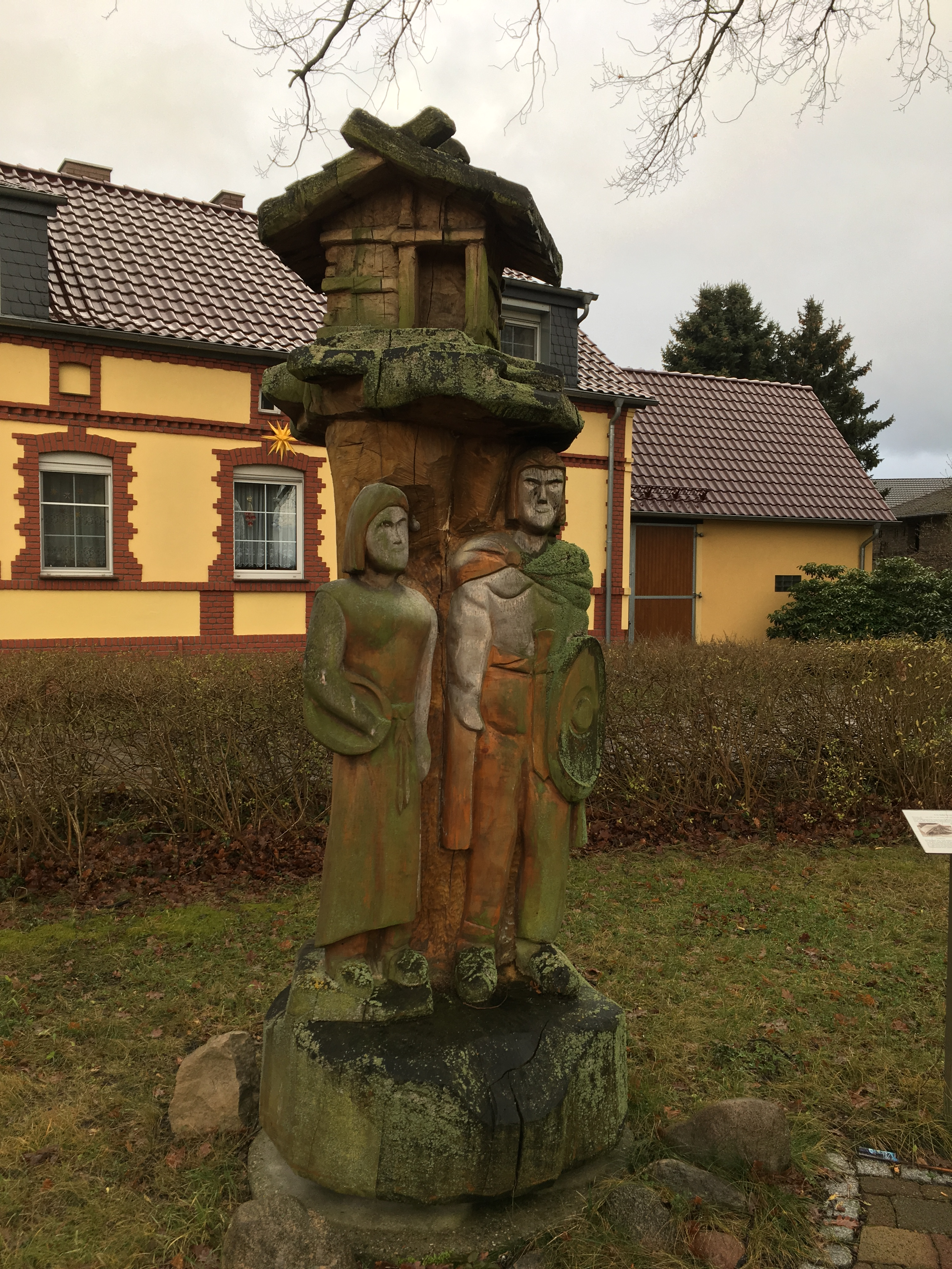 Germanenskulptur mit Grubenhaus auf dem Dorfanger in Klein Besten, Gemeinde Bestensee in Brandenburg